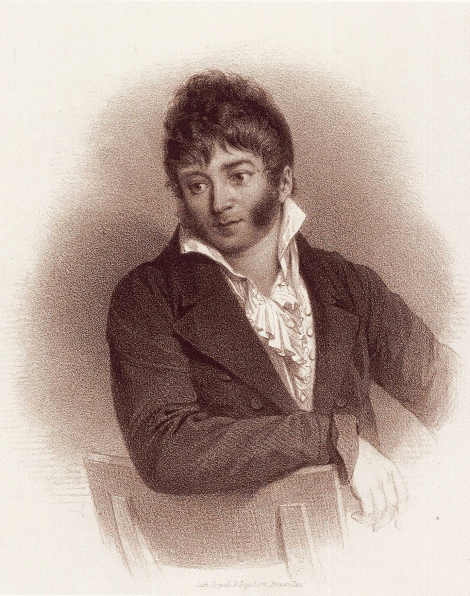 Portät Jean-Baptiste van Mons